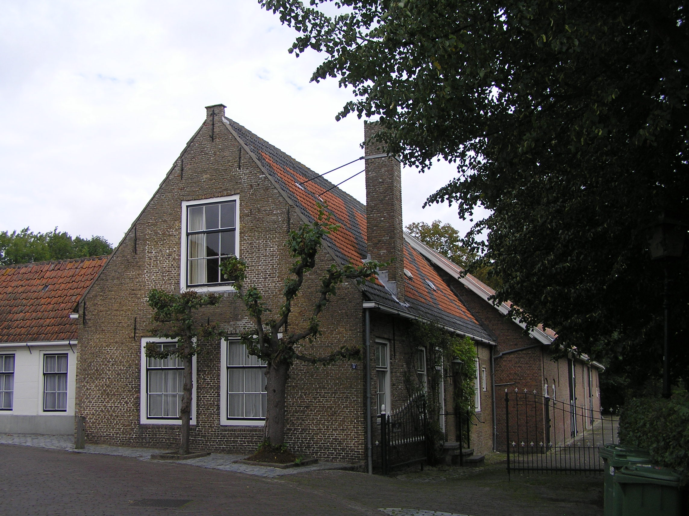 Kloetinge, Jachthuisstraat 17